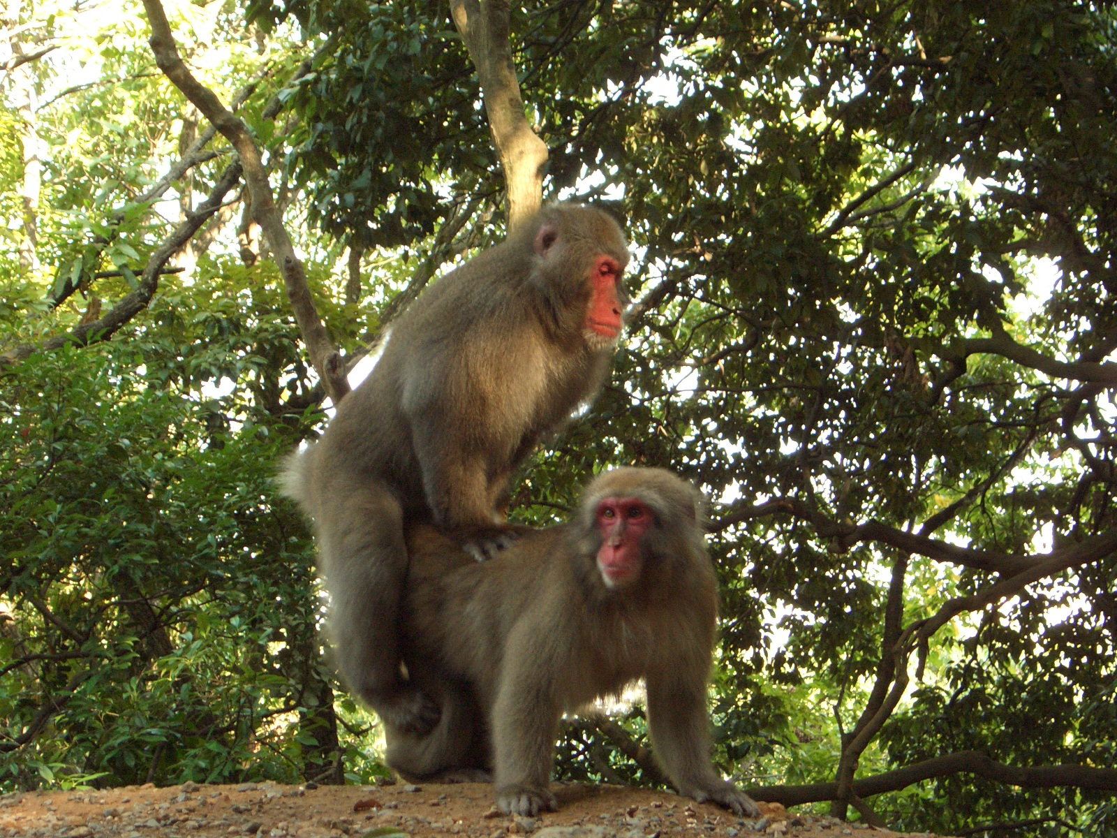 ニホンザルの交尾風景。 嵐山モンキーパークいわたやま。